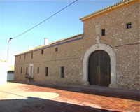 parador del siglo XV